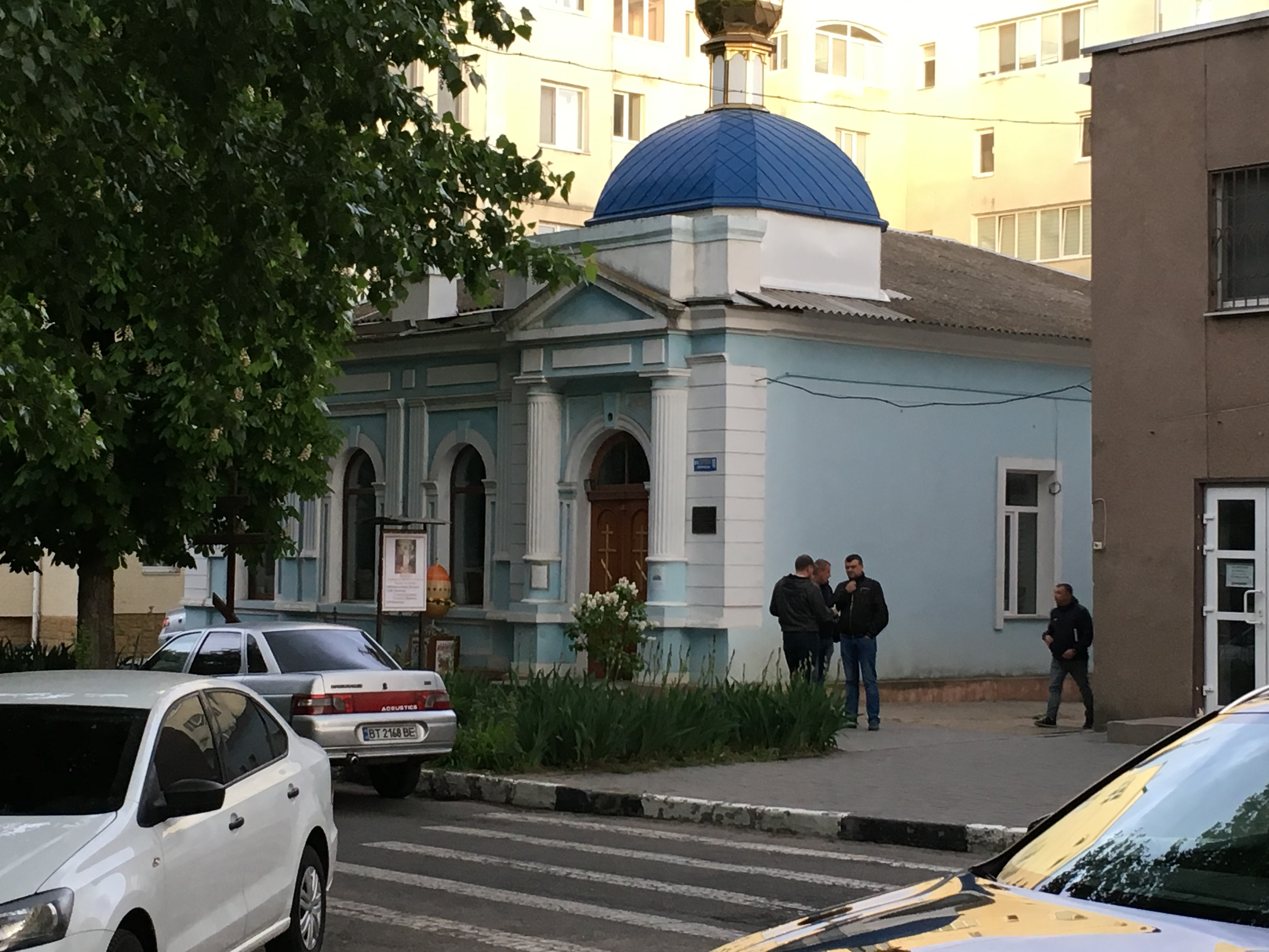 Church_Luteranska_10